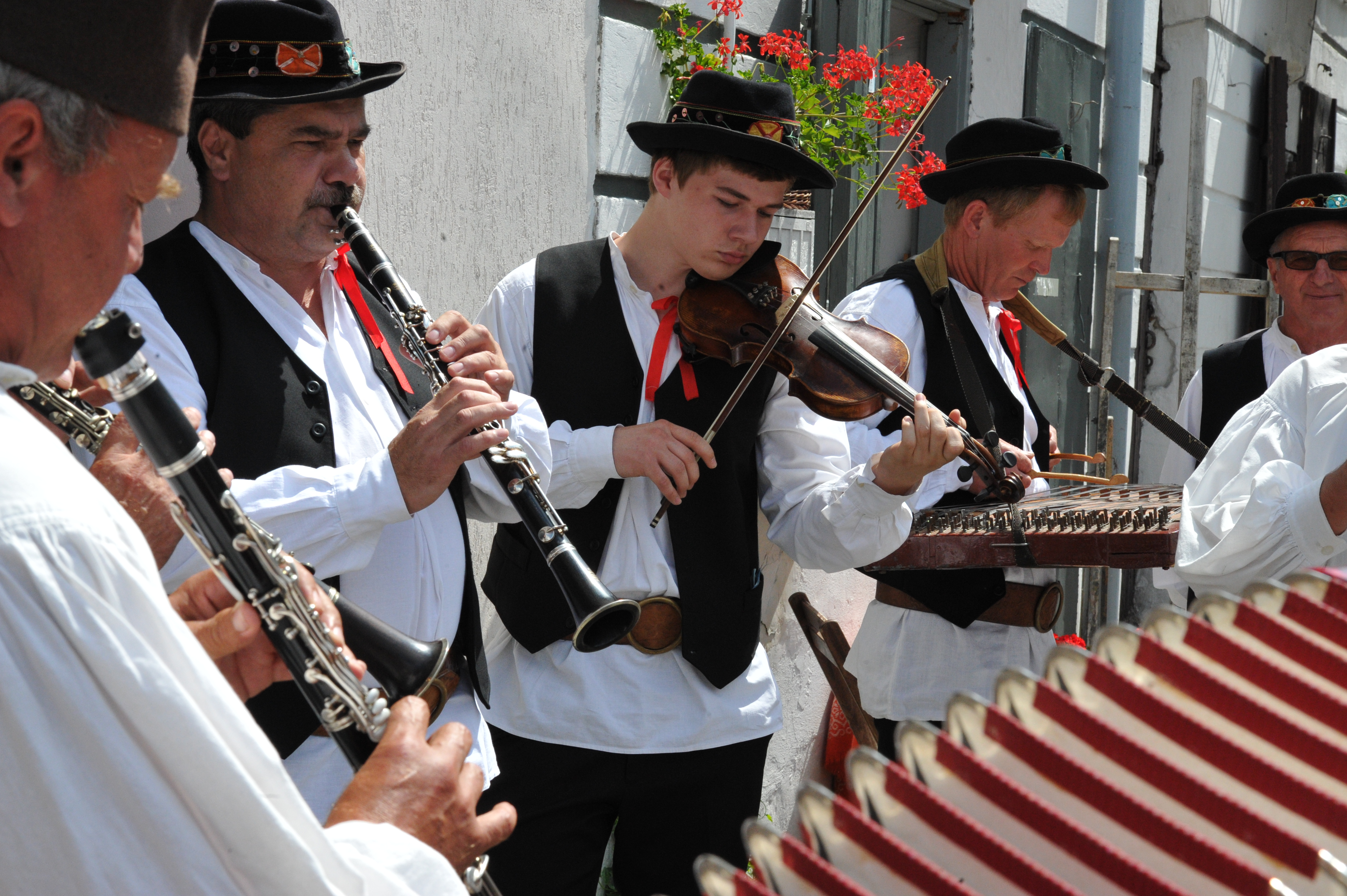 Festiwal Kapel i Śpiewaków Ludowych w Kazimierzu Dolnym